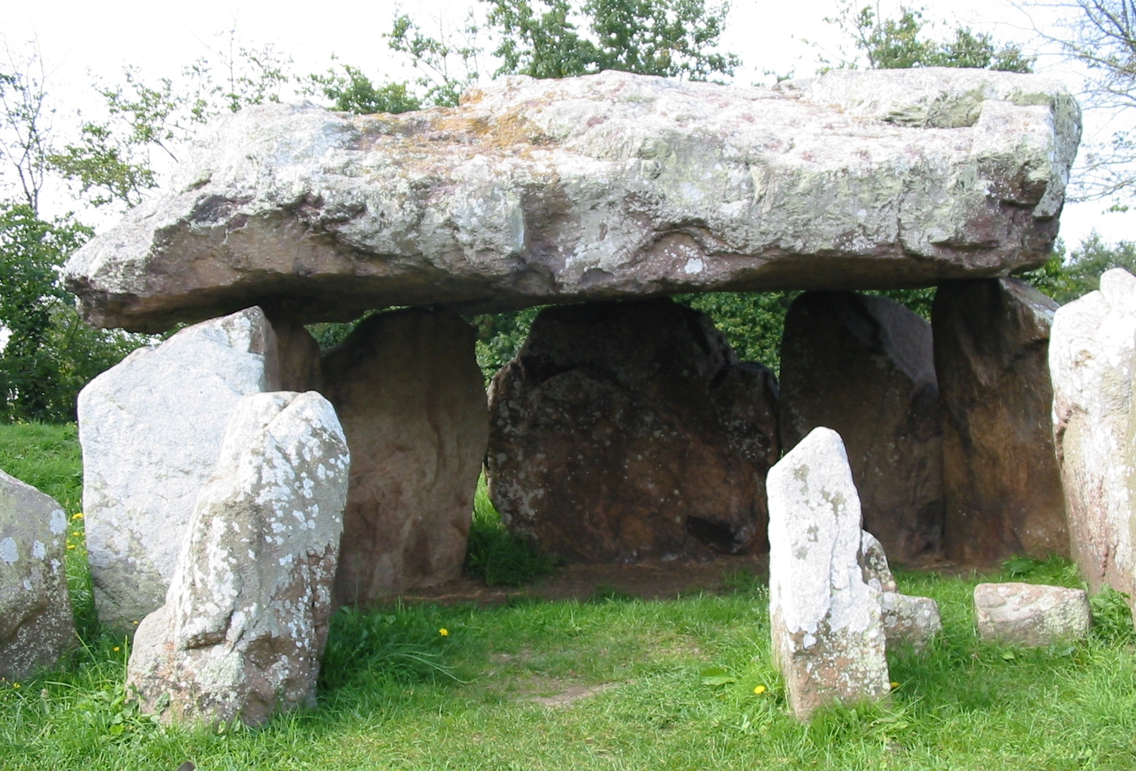 Nrf: Jèrri